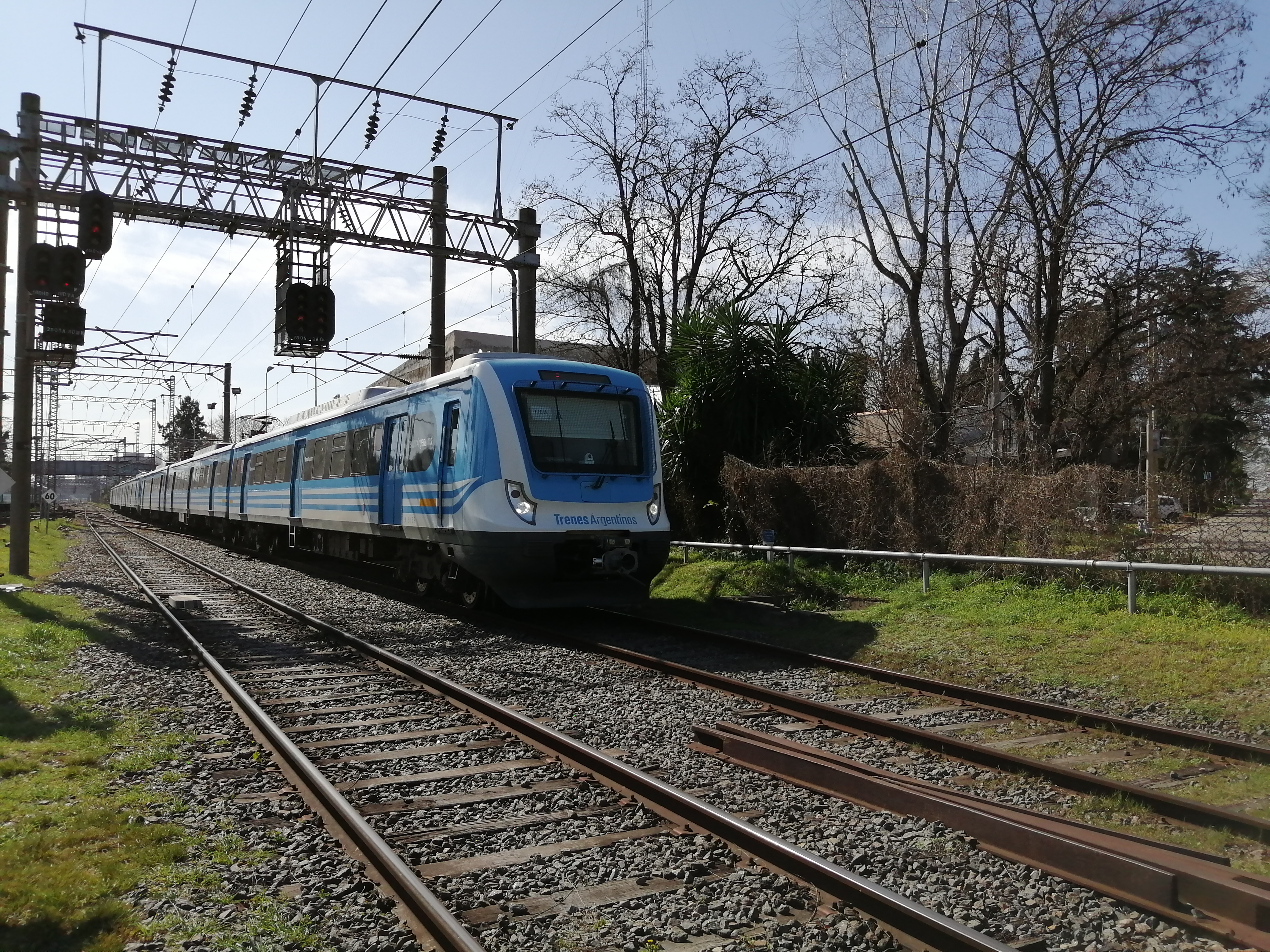 Tren electrico del Ferrocarril Roca modelo CSR en servicio en el ramal Plaza Constitución - Alejandro Korn a mitad de camino entre la estación de Temperley y Adrogué